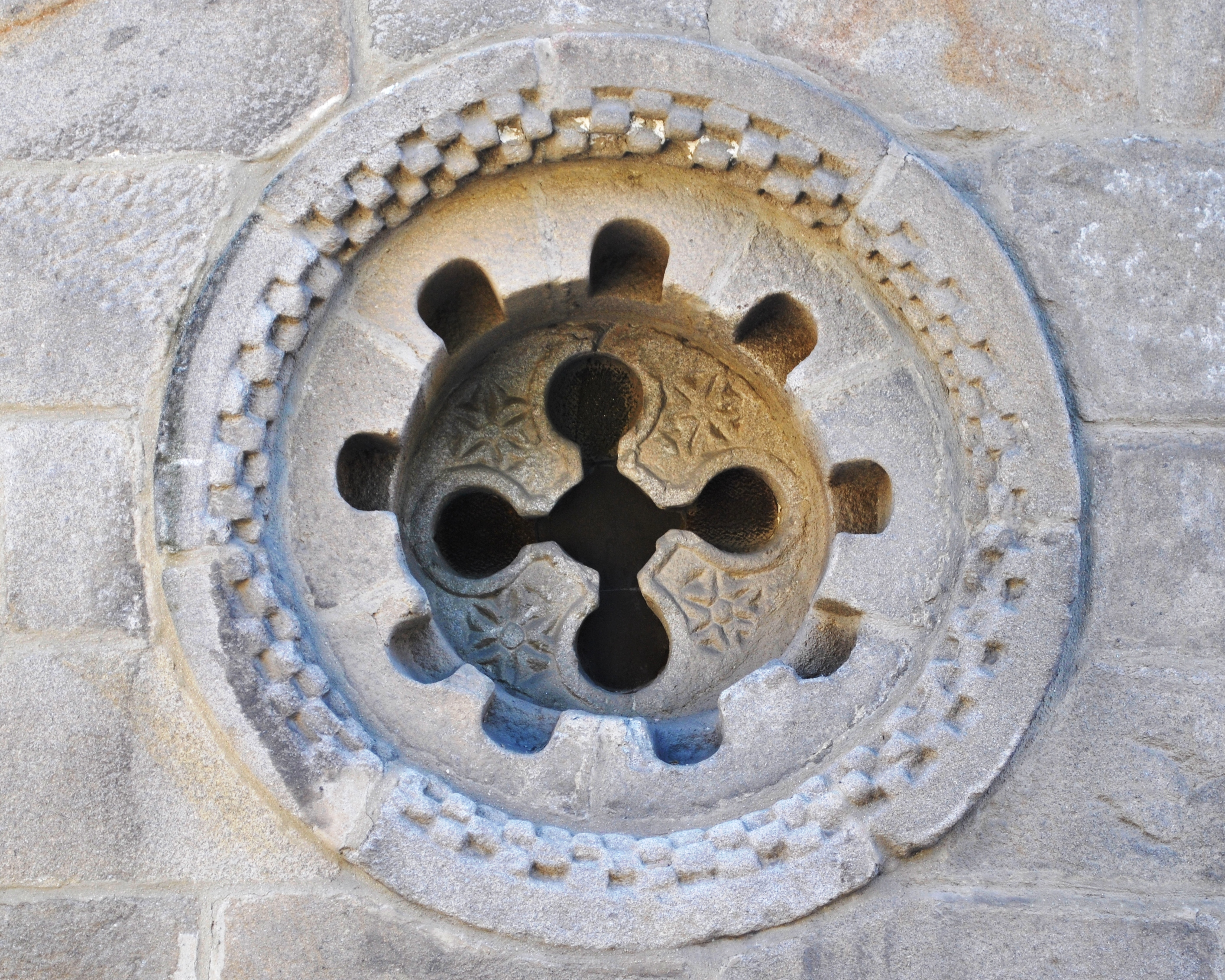 Vexa o título e as categorías.